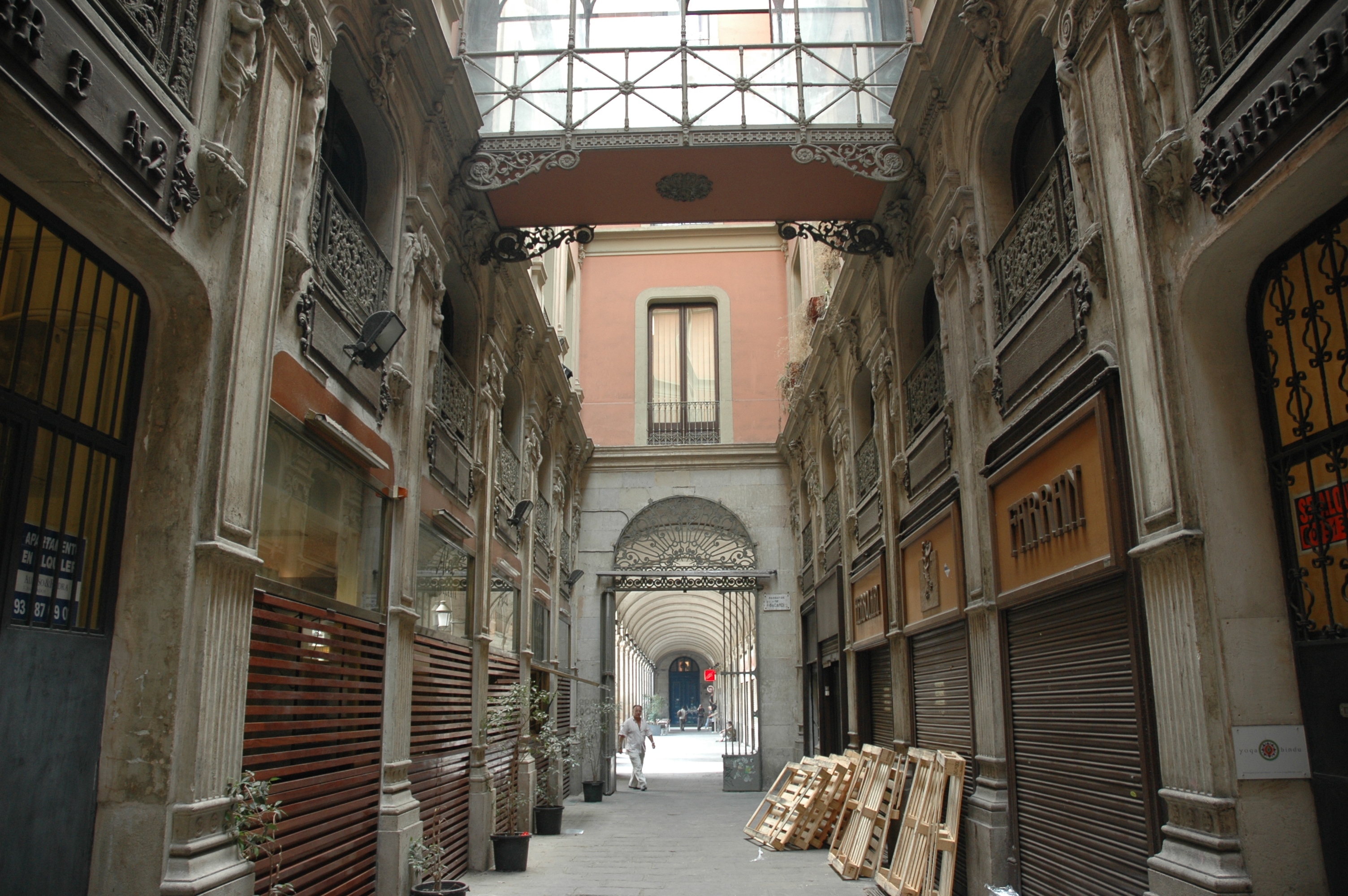 Barcelona - Plaça Reial - Ptge. Bacardí